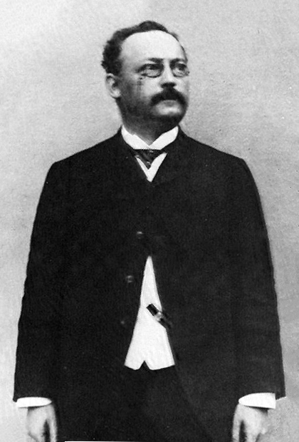 Hermann Einstein, Albert Einstein's father